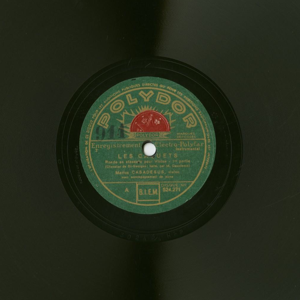 Disque vinyl. Les Caquets : rondo en Staccato pour violon de Joseph Bologne de Saint-George, compositeur. Harmonisation par M. Casadesus ; Marius Casadesus, Violon, accompagné de piano. Ecouter : Joseph Boulogne Chevalier de Saint-Georges - Marius Casadesus.- Les caquets : rondo en staccato Disque 1 : Les Caquets, 1ere partie, Face A. ; Disque 1 : Les Caquets 2e partie, Face B.